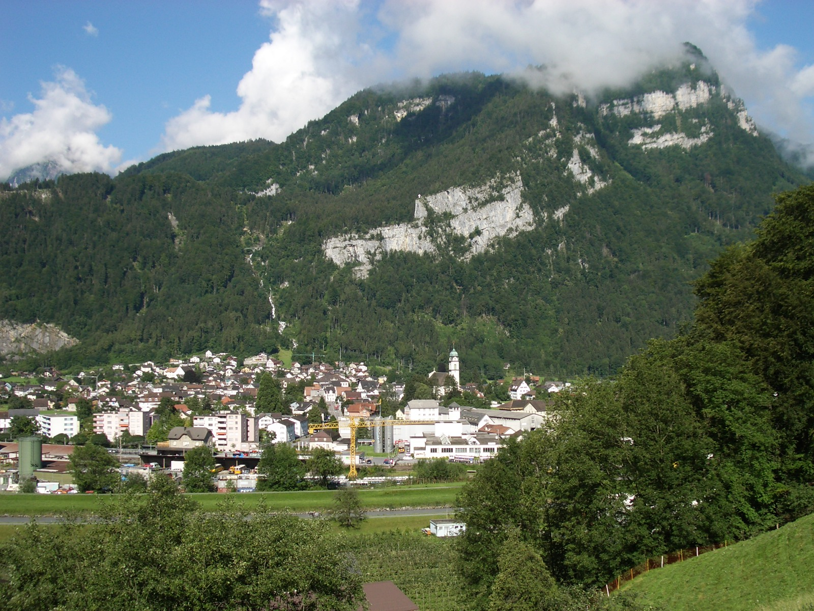 Kerenzerberg GL, Schweiz